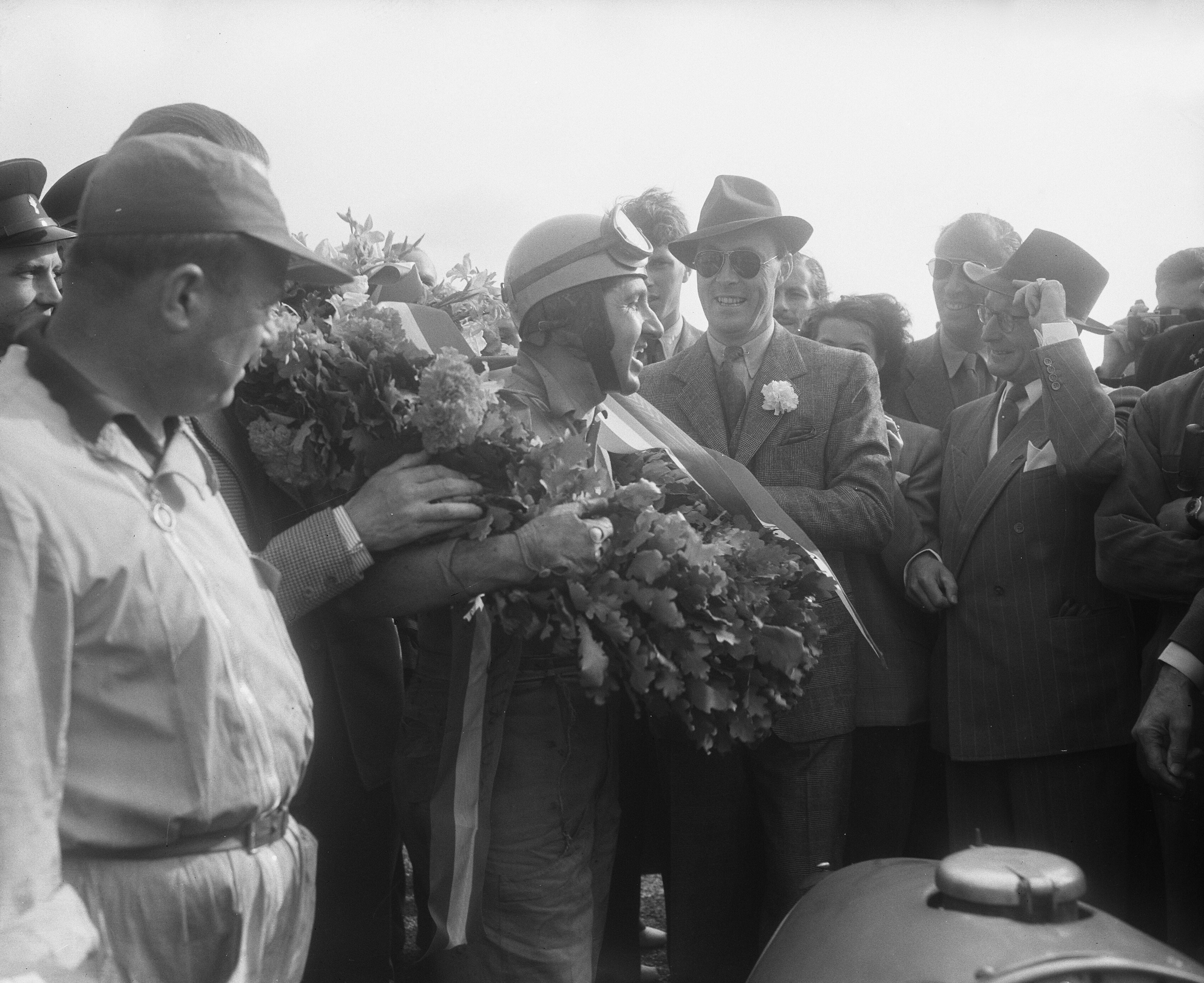 Collectie / Archief : Fotocollectie Anefo Reportage / Serie : Grand Prix Zandvoort 1953 Beschrijving : Autoraces Dutch Grand Prix Zandvoort. Winnaar Alberto Ascari met prins Bernhard Datum : 7 juni 1953 Locatie : Noord-Holland, Zandvoort Trefwoorden : auto's, sport Persoonsnaam : Ascari, Alberto, Bernhard (prins Nederland) Fotograaf : Pot, Harry / Anefo Auteursrechthebbende : Nationaal Archief Materiaalsoort : Glasnegatief Nummer archiefinventaris : bekijk toegang 2.24.01.09 Bestanddeelnummer : 905-7658